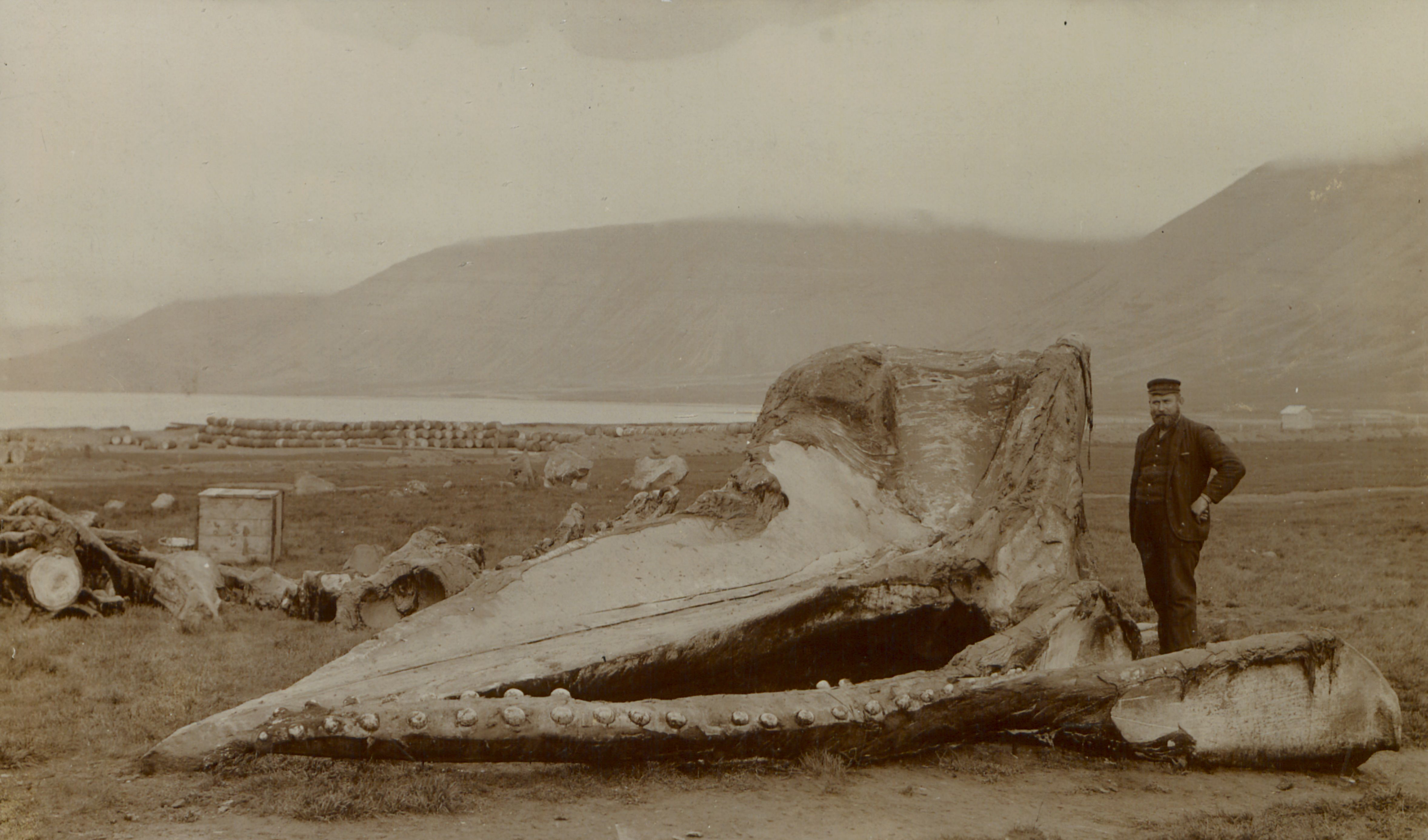 Kaskelotkranium på Island